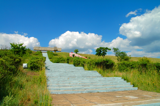 В райне речки Миус расположен мемориальный комплекс Миус-Фронт.В грозные 40-е здесь держали героическую оборону Донбасса шахтерские дивизии.